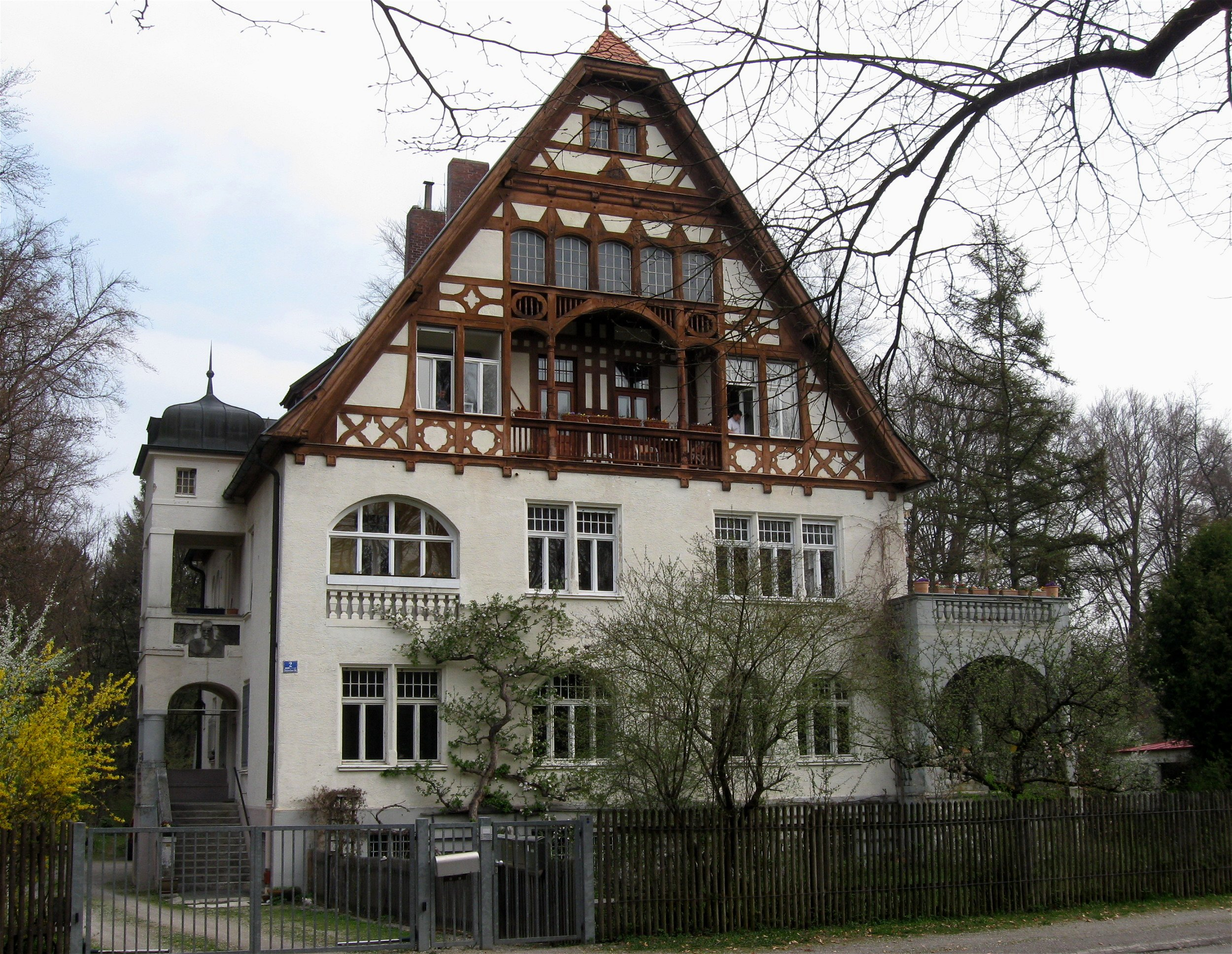 Holzkirchner Straße 2; Stattliche Villa, Fachwerkstil, bez. 1905, von Carl Ebert